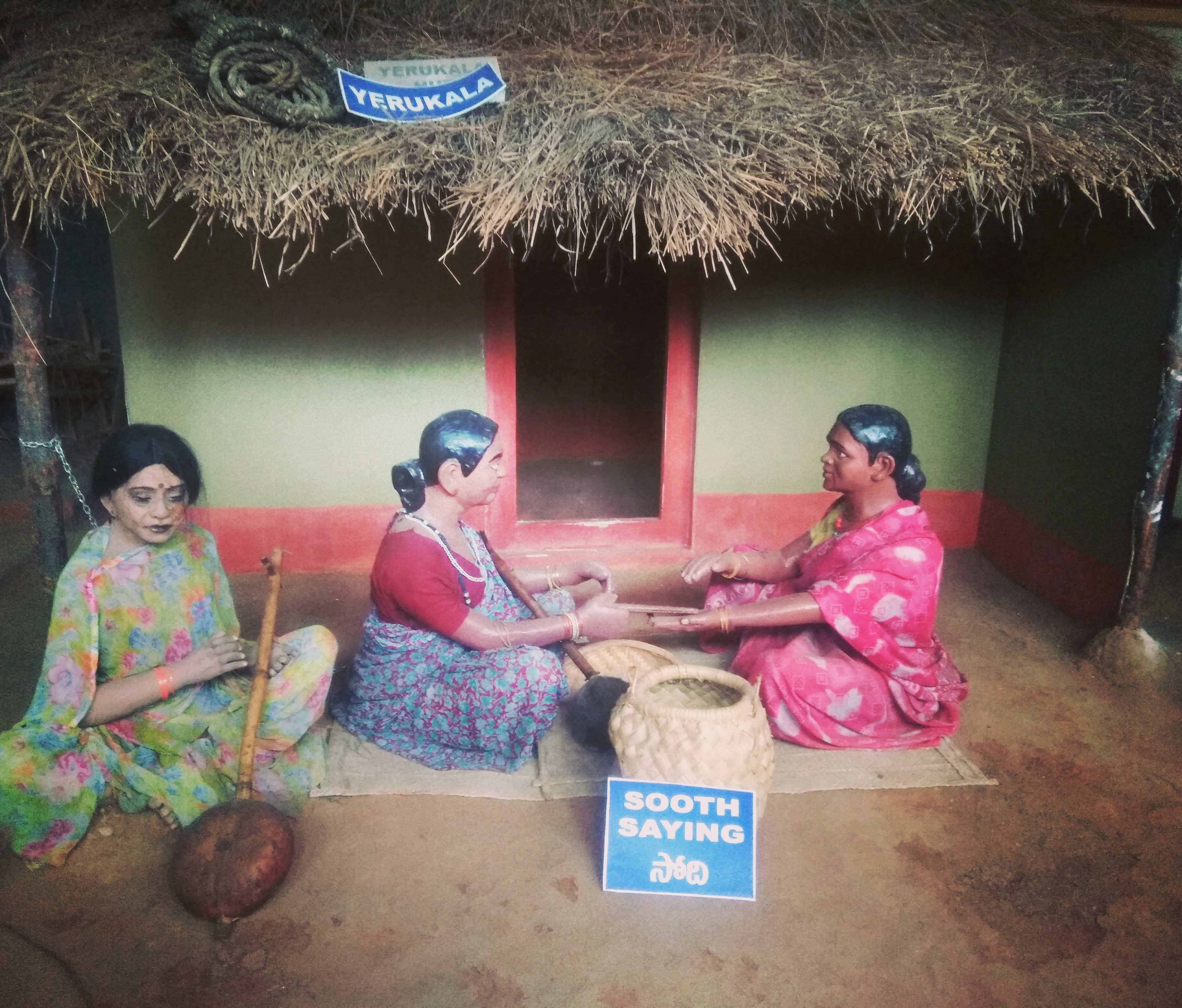 ఎరుకలు అనే వారు ఒకరకమైన అటవీ తెగకు సంబంధించిన వారు.వీరు కర్ణాటక, కేరళ రాష్ట్రల మధ్యలో కుర్రుకొండ అనే ప్రాంతం నుండి అన్ని ప్రాంతాలకు విస్తరించారు.ఎరుక అనే పదం తమిళం నుండి వచ్చింది.ఎరుక అంటే తెలివి,ప్రఙ్ణ,వివేకం,తెలిసి ఉండటం,గుర్తు,స్నేహం అని అర్థం. ఎరుకల వారికి ప్రత్యేక భాష కలదు.దీనికి లిపి లేదు.వీరు మాట్లాడే భాషను 'కుర్రు ' అని అంటారు. ఎరుకల ముఖ్య వృత్తులు: అల్లికలు,బుట్టలు,గంపలు,చాపలు,తడికలు,తట్టలు మెుదలైనవి తయారుచేస్తారు.వీటితో పాటూ వేట కూడా వీరి జీవితం లో ముఖ్య భాగం.వీరు విల్లును ప్రయెూగించటంలో మంచి నైపుణ్యం కనబరుస్తారు.వీరు పందులు,గాడిదలను,బాతులు,కోళ్లు,మేకలు మెుదలైన జంతువులను పెంచుకుంటారు. కొన్ని చోట్ల వ్యవసాయం చేస్తారు. సోది: సోదిని ఎరుకల స్త్రీలు మాత్రమే చెబుతారు.కేవలం స్త్రీల వృత్తి, వేషంపై ఆధార పడి వారి తెగకు ఈ పేరు రావడం ఒక ప్రత్యేక అంశంగా చెప్పవచ్చు.సోది చెప్పే స్త్రీలను ఆంధ్రప్రదేశ్ లో ఎరుకల సాని అని, కర్ణాటక ప్రాంతంలో కురువంజి అని పిలుస్తారు. సోది చెప్పే స్త్రీ ముఖానికి పసుపు రాసుకుని పెద్ద కుంకుమ బొట్టు పెట్టుకుని సోదిబుర్రను వాయిస్తూ చంకలో ఒక బుట్టను పట్టుకుని అందులో అమ్మవారి విగ్రహం లేదా పటాన్ని పెట్టుకుంటారు. ప్రాముఖ్యత: సోదికి జ్యోతిష్యంతో సమానమైన శాస్త్ర పరిజ్ఞానంతో కూడిన విశేష స్థానం ఉంది.సంస్కృత, తెలుగు సాహిత్యాలలో వీరిని గూర్చి ప్రస్థావన ఉంది. ఎరుకల జాతి ఇతిహాస పురాణాలైన రామాయణంలో శబరి మరియు మహాభారతంలో ఏకలవ్యుడు.విష్ణు పురాణంలో ఎరుకలి నాంచారమ్మ మెుదలైన వారంతా ఎరుకలి వారని మనకు సాహిత్యం ద్వారా తెలియుచున్నది. కలియుగ దైవమైన శ్రీ వేంకటేశ్వర కళ్యానం పద్మావతితో జరగడానికి ఈ ఎరుకల సోదే కారణమనే కథ ఉంది.